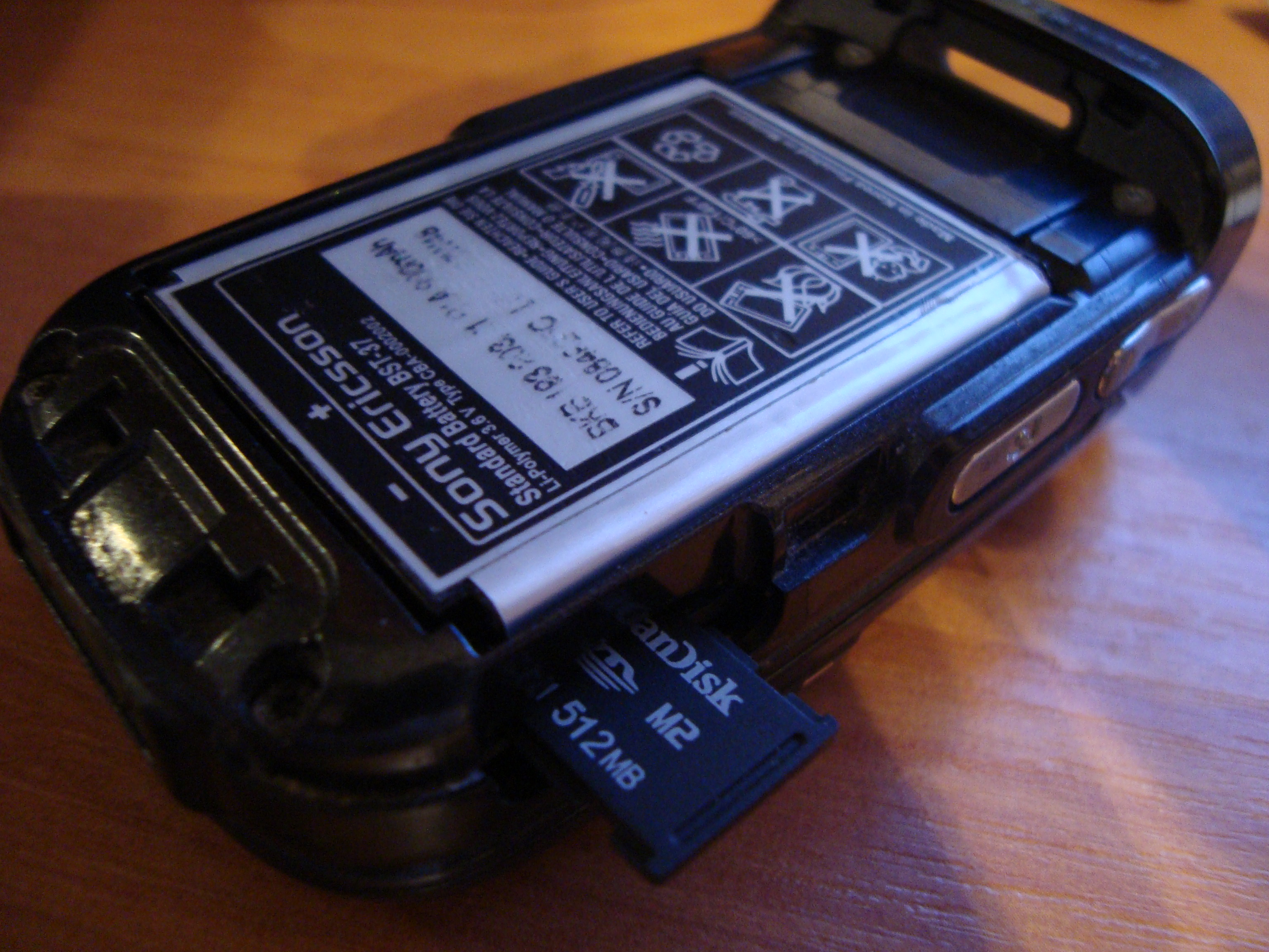 Аккумулятор телефона Z710i и слот для карты памяти, фотографировал перед загрузкой.